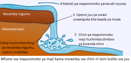 Kiswahili: mabadiliko kwenye maporomoko ya maji; ni File:WaterfallCreationDiagram.svg iliyoswahilishwa